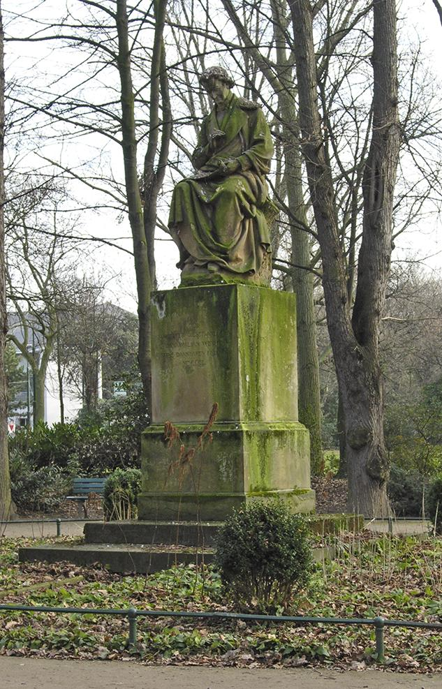 Maximilian Friedrich Weyhe-Denkmal im Hofgarten Düsseldorf. Bildhauer: Carl Hoffmann (Bildhauer)